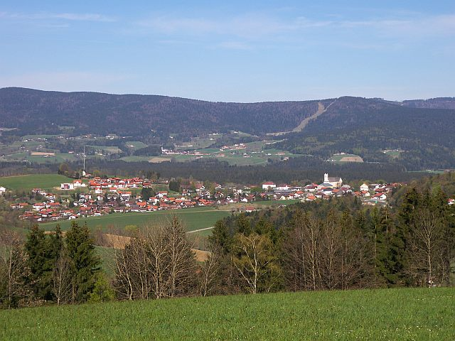 Breitenberg